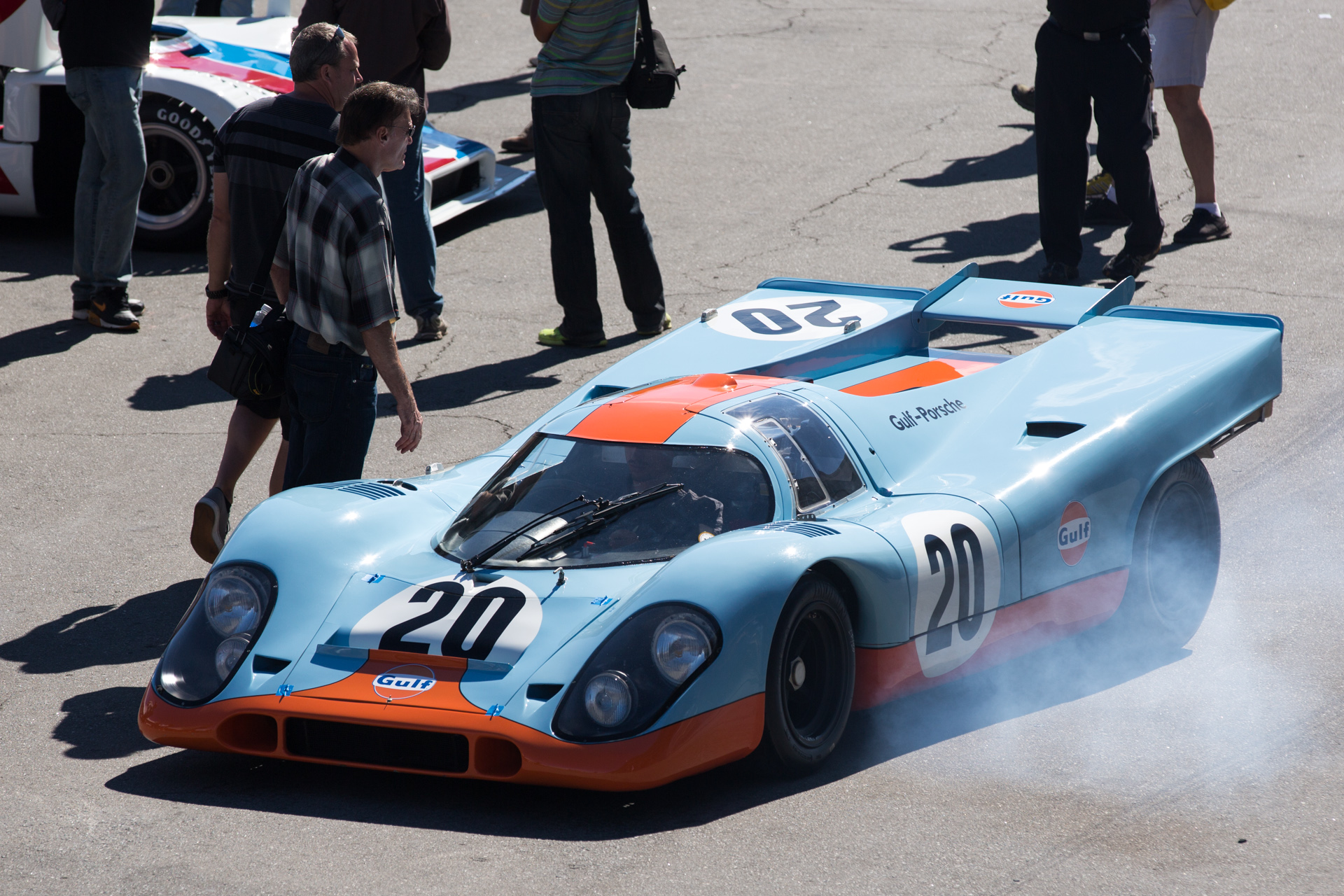 Rennsport Reunion V